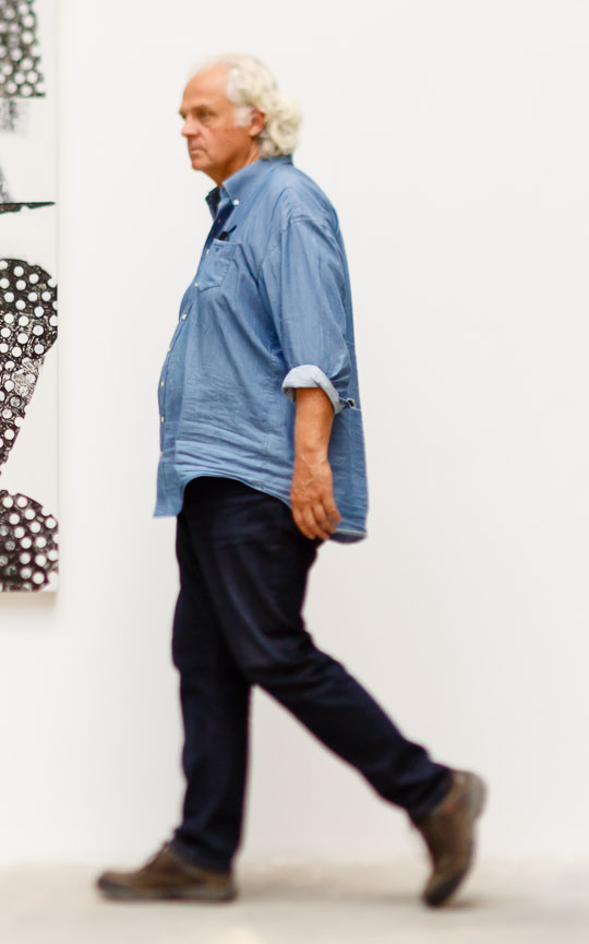 Vue d’Yves Zurstrassen dans son atelier au printemps 2017, pendant le tournage de Yves Eirstrasden peintre un film de Michelle Porte